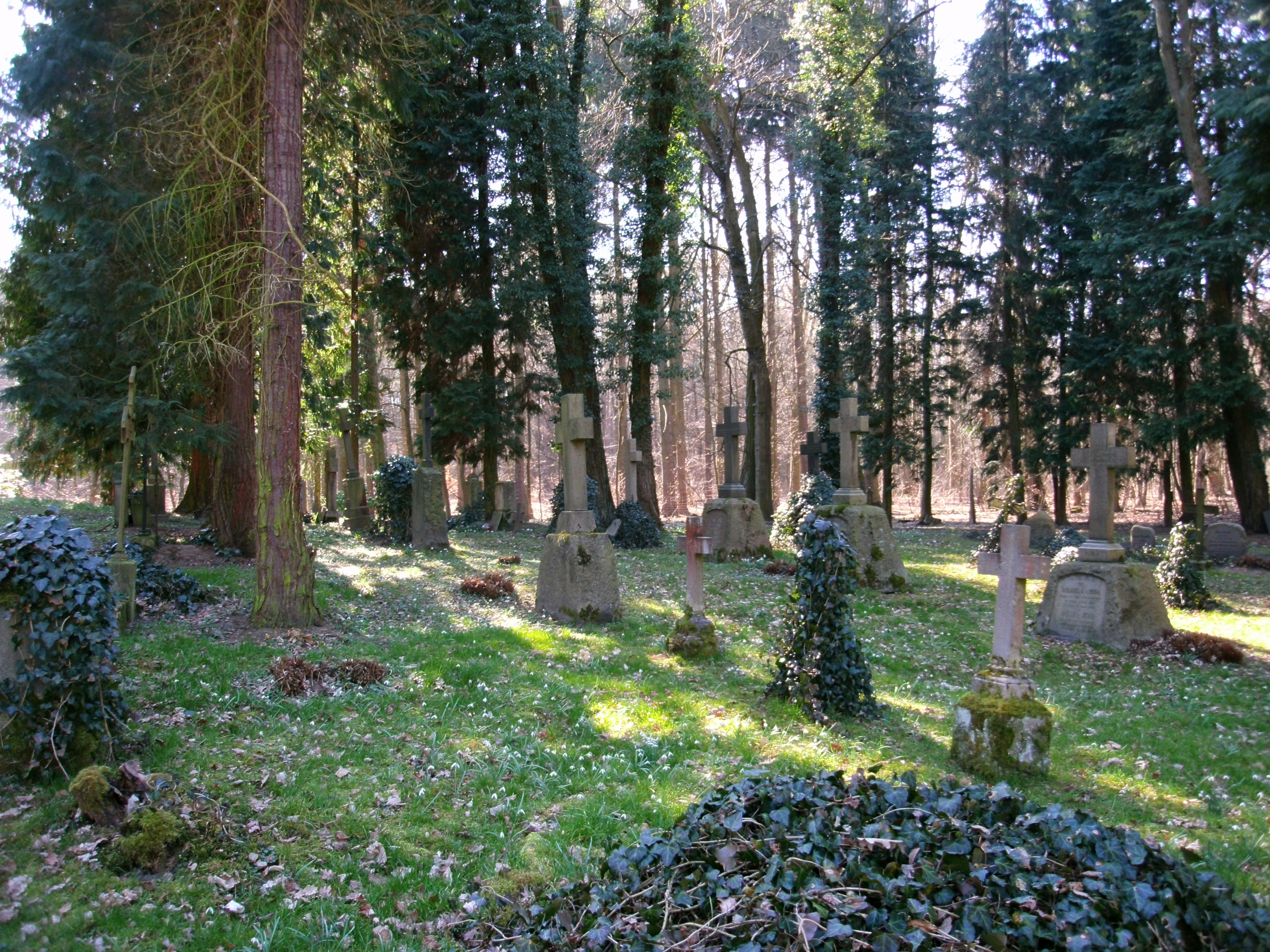 Begräbnisstätte der Familie von Jena in Cöthen, Ortsteil von Falkenberg (Mark)